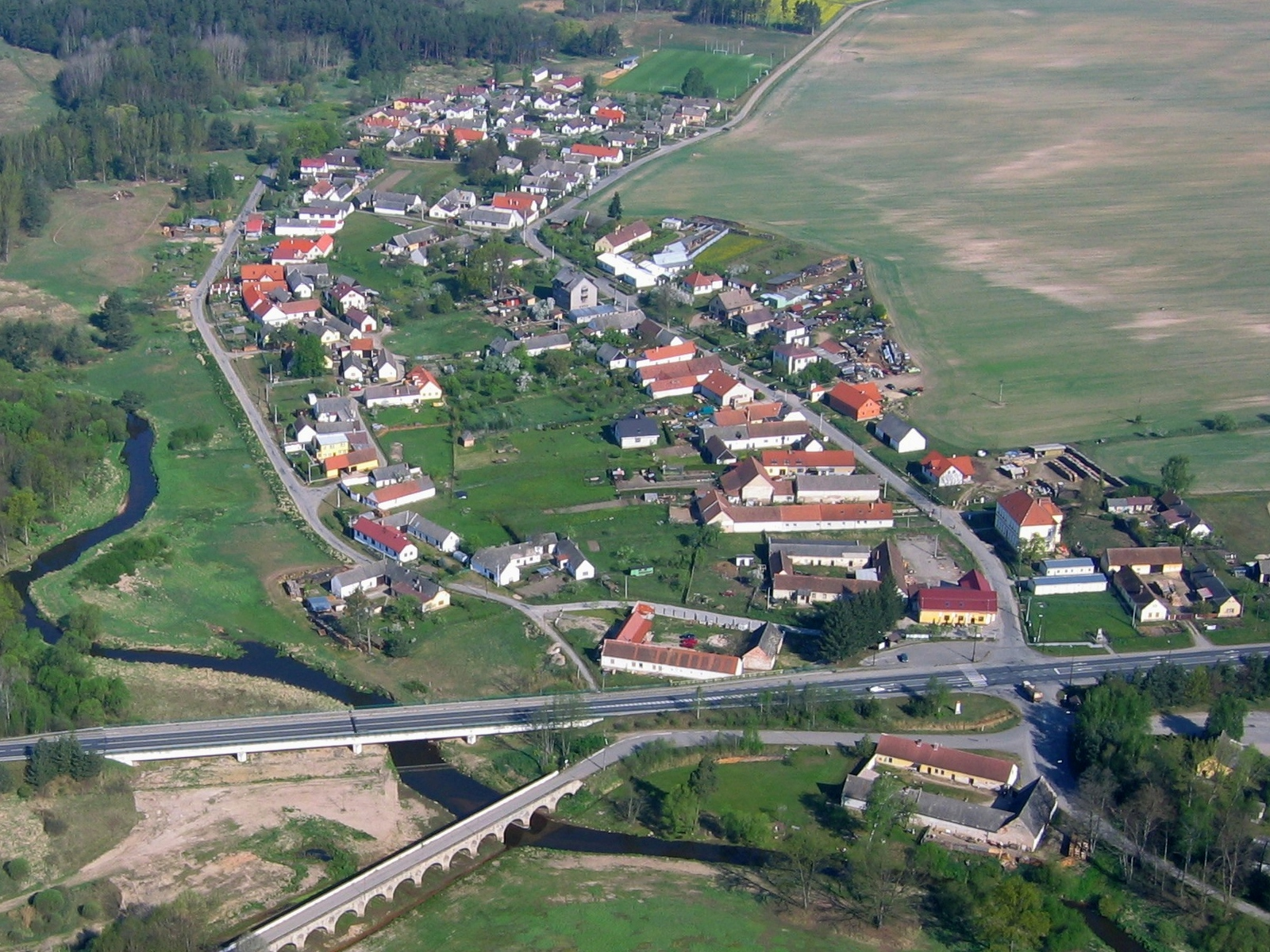 Inundační most I. (Stará Hlína), J od obce, Stará Hlína